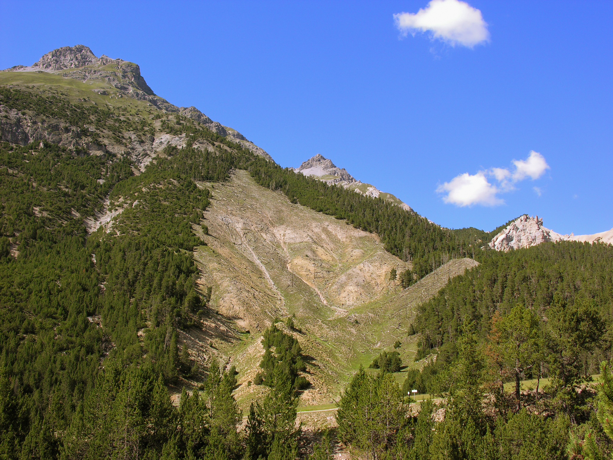 Switzerland, Graubünden, Swiss National Park